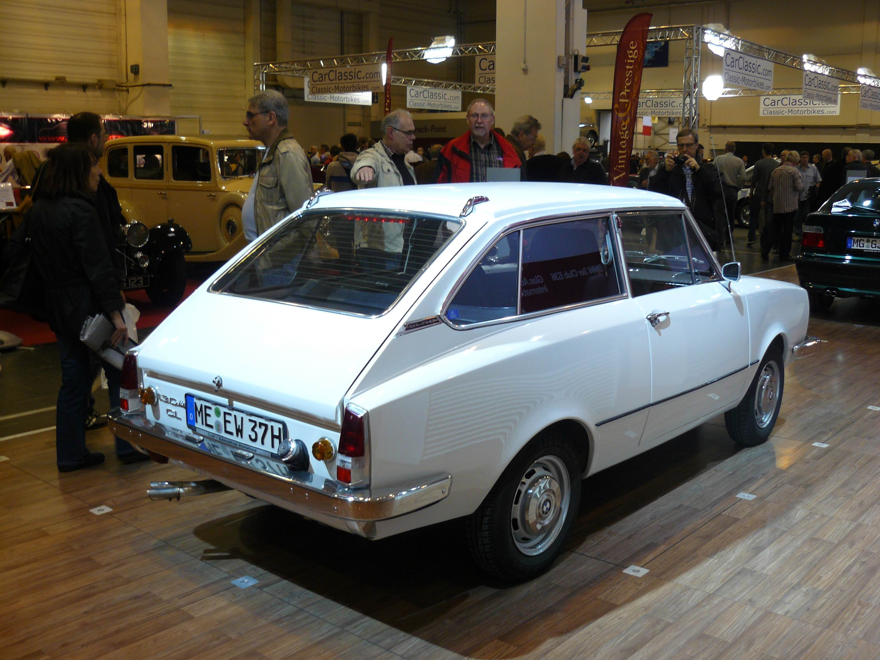 Essen 2011